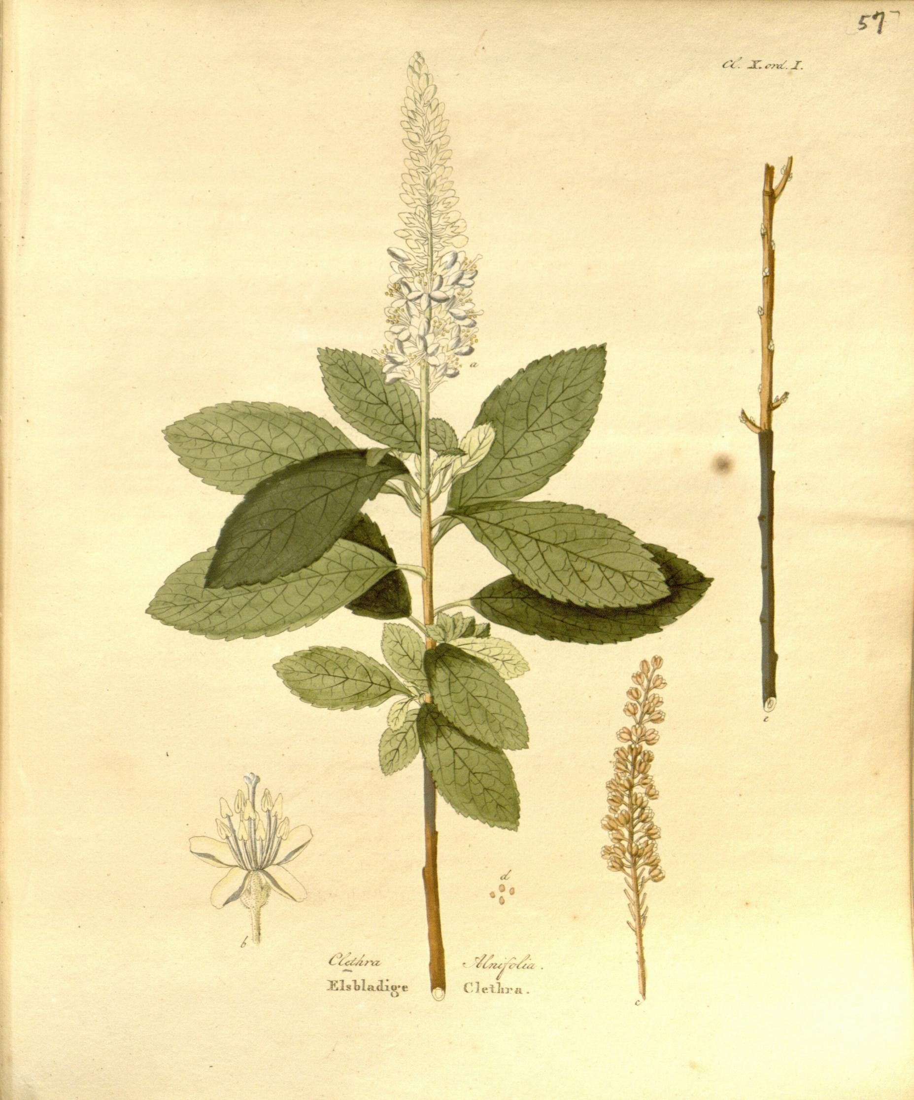 n t t I i \i i I i- c\ -^^ «^. f V, m ^ '-\